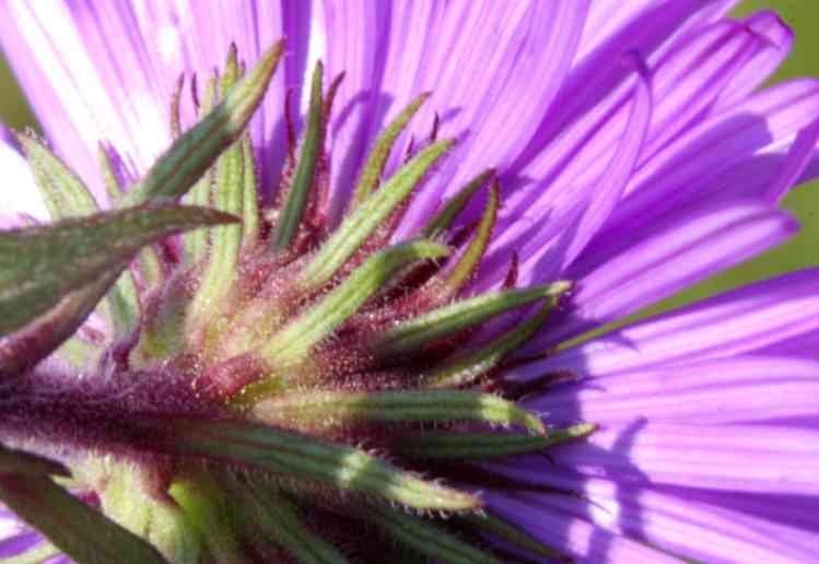 Astro di Virgilio, Villa Prima, Limana (BL), 350 m s.l.m.